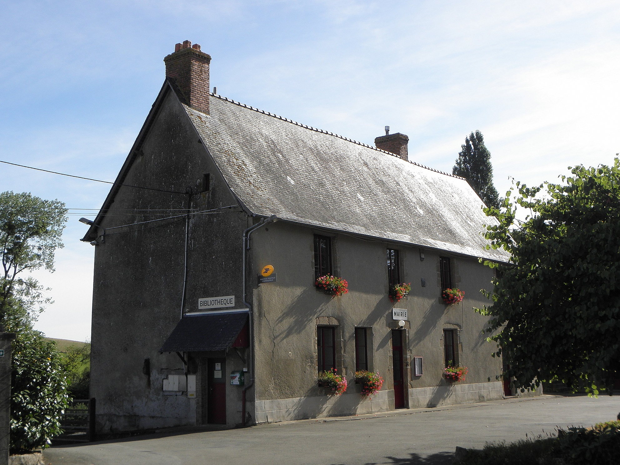 Mairie de Saint-Pierre-sur-Orthe (53).